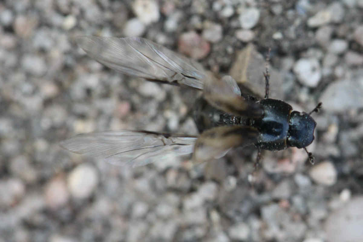 Aphodius distinctus am 3.4.2017 in der Schwetzinger Hardt